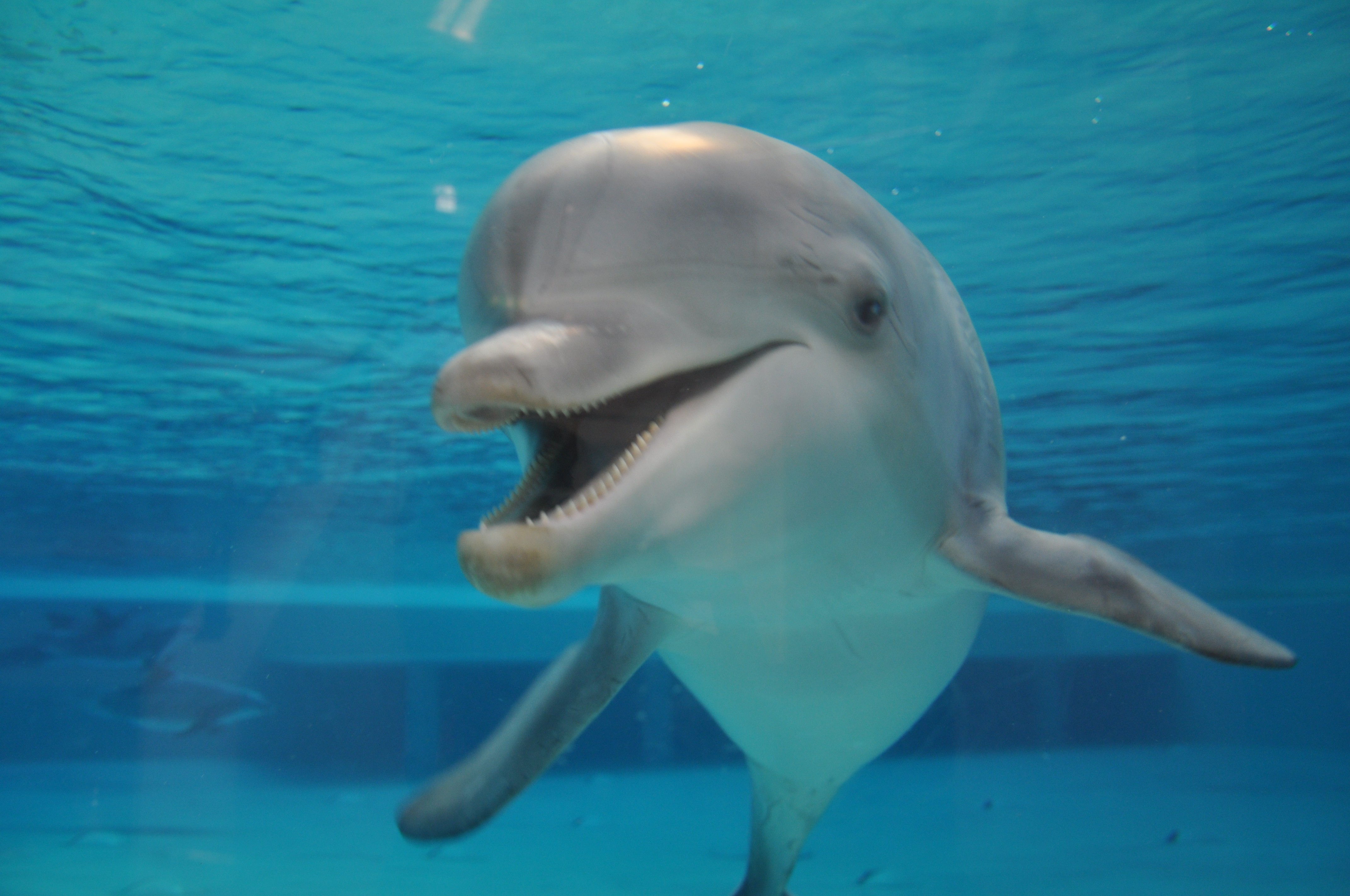 En av Kolmårdens delfiner i djurparken, Norrköping